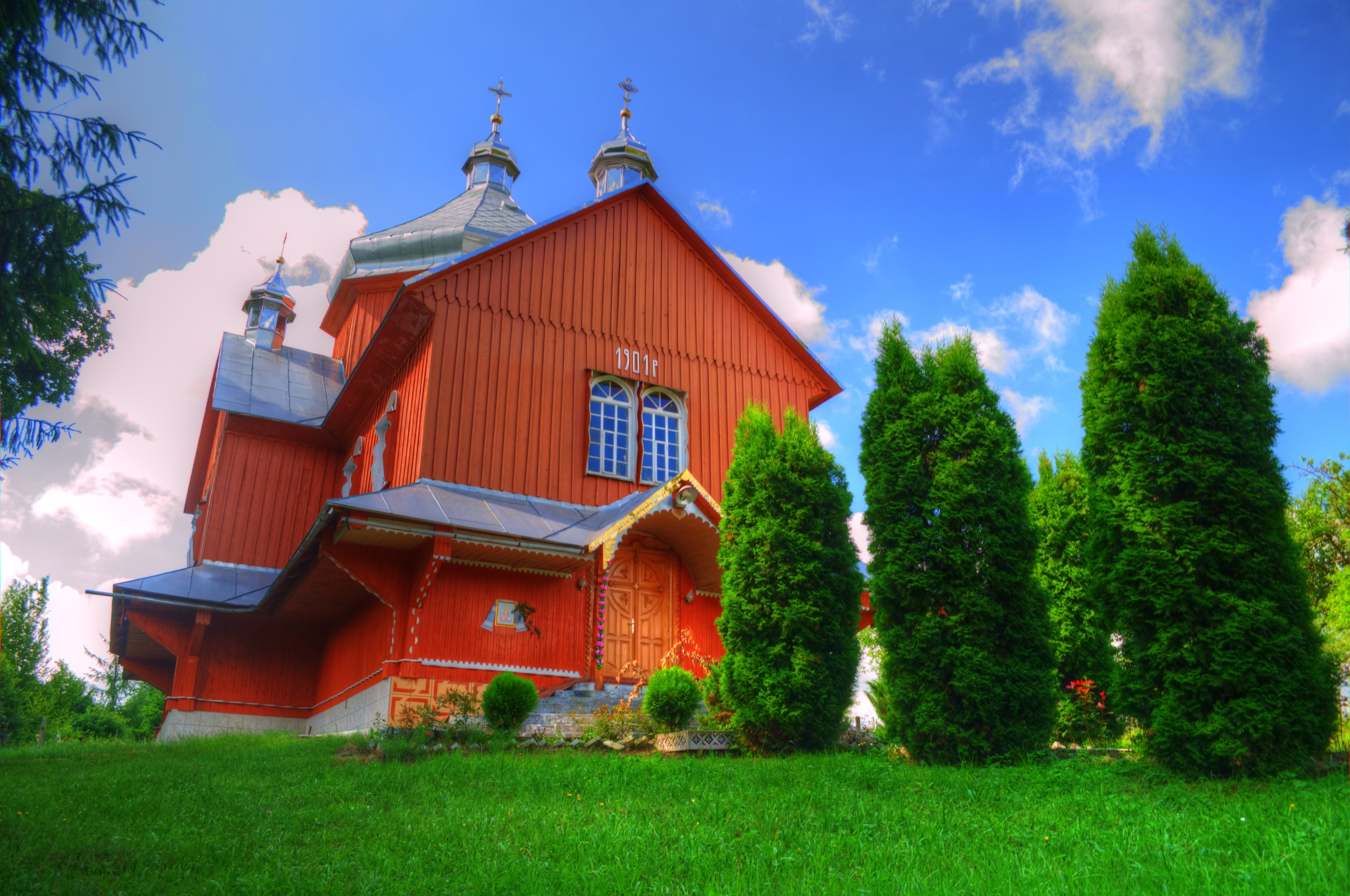 Дерев'янна церква в селі Лисків 1901 рік